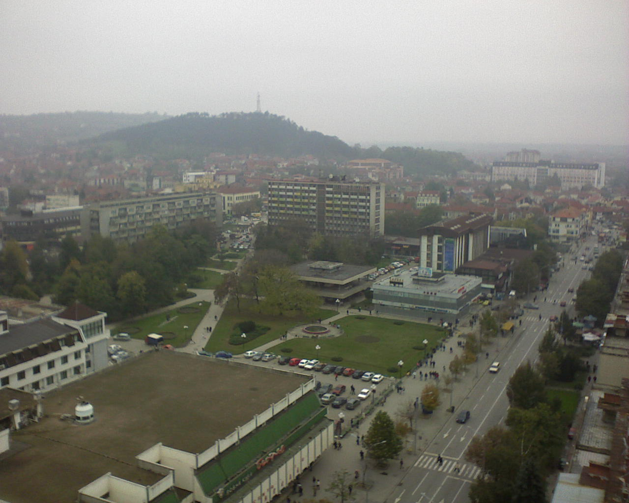 Leskovac